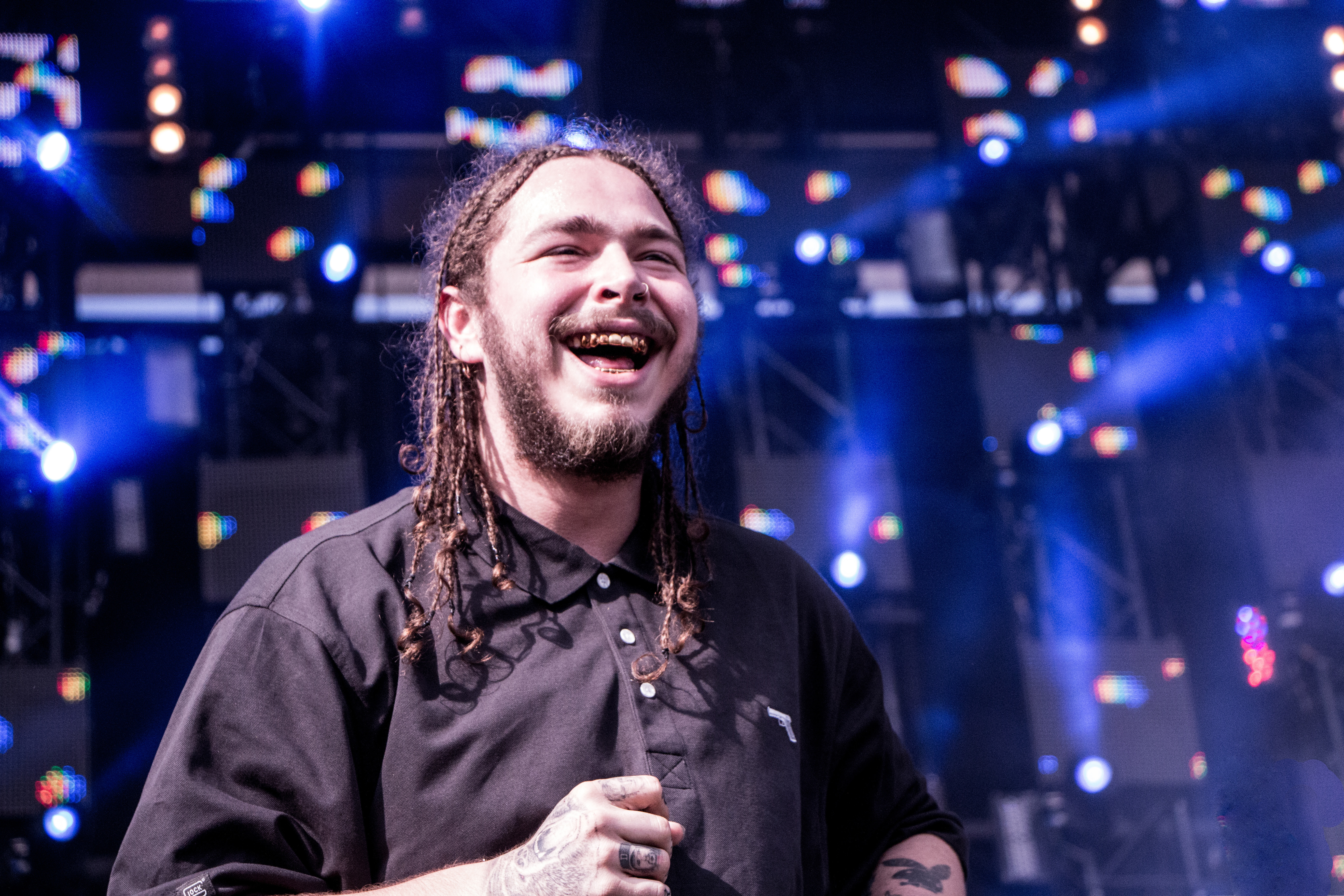 VELD 2016